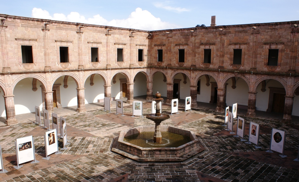 El Centro Cultural Clavijero se ubica en la ciudad de Morelia, Michoacán, México, es un centro cultural público dedicado albergar exposiciones temporales de instituciones culturales públicas y privadas. El recinto tiene su sede en lo que fue el antiguo Colegio de la Compañía de Jesús, de estilo barroco del siglo XVIII.